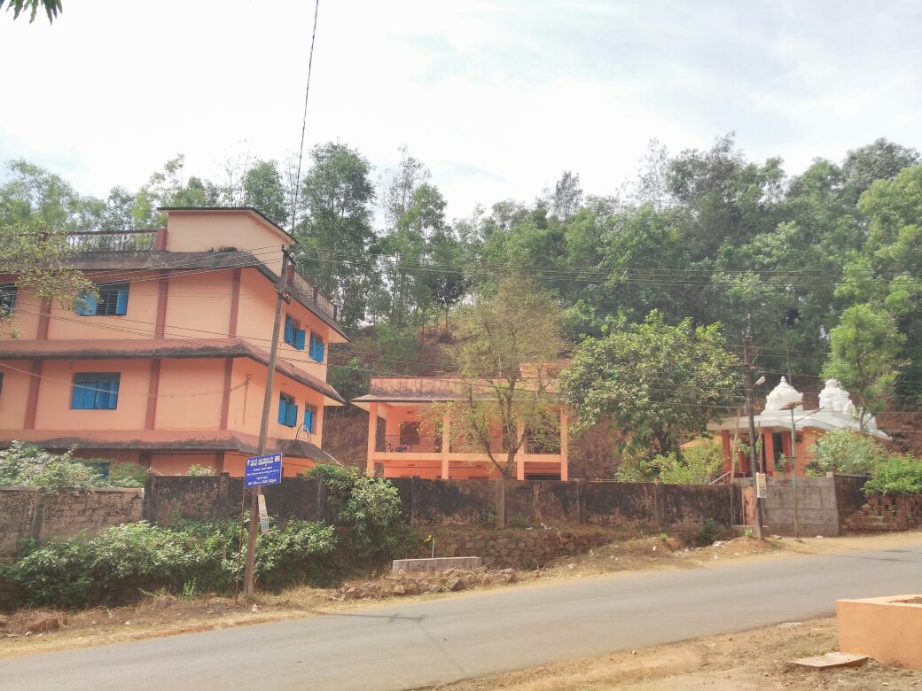 ಕನ್ನಡ: ಭಾರತ ಸೇವಾಶ್ರಮ - ಕನ್ಯಾನ